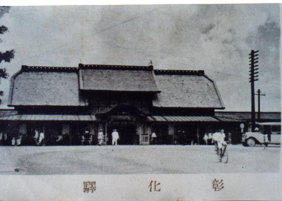 1905年設立之彰化驛舊照